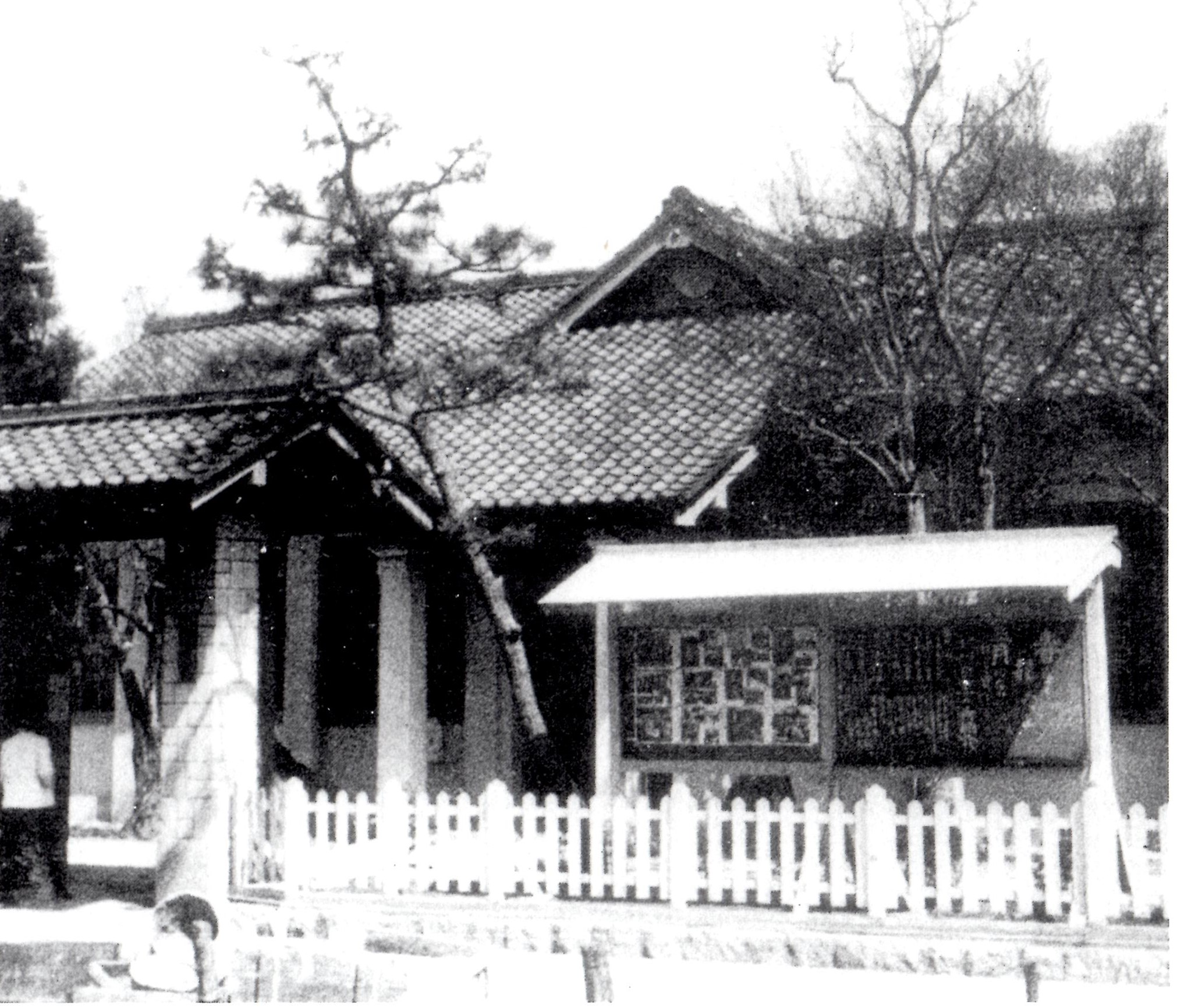 1954年頃の挙母市立図書館。挙母市は現在の豊田市。